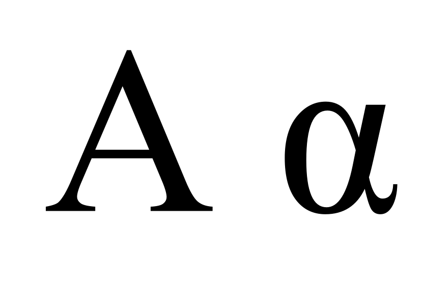 Greek letter alpha